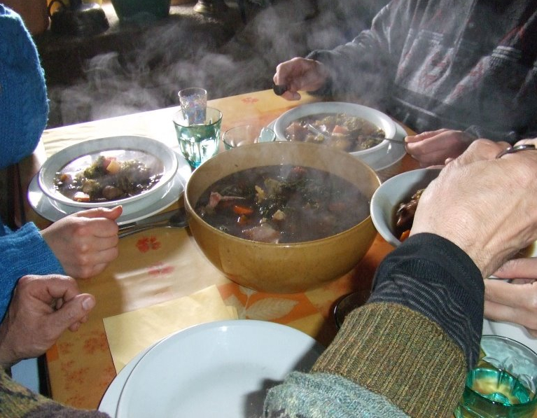 Potée. Buron de la Thuilière, refuge.